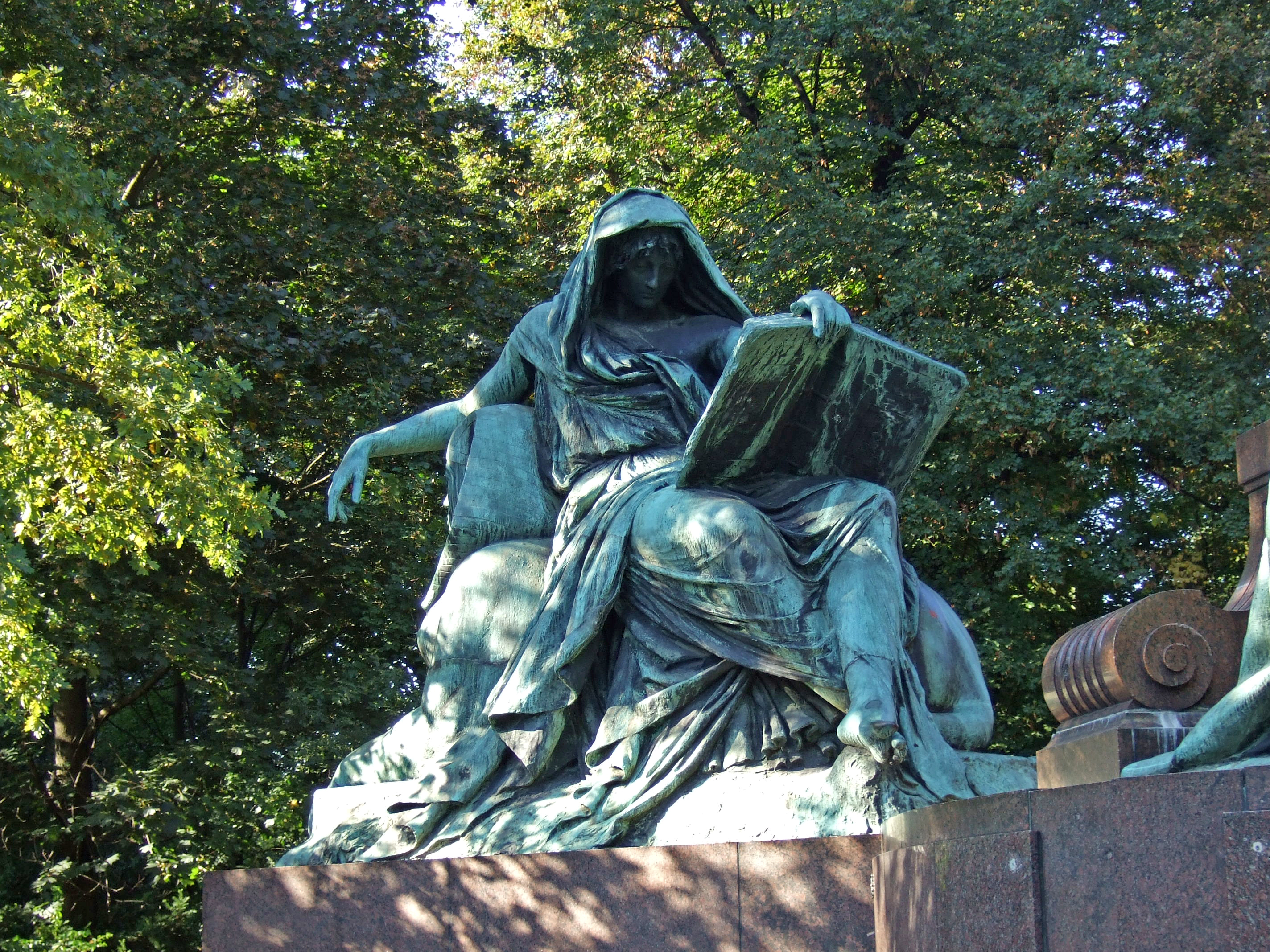 Sibylle auf dem Rücken einer Sphinx, ins Buch der Geschichte schauend (1)